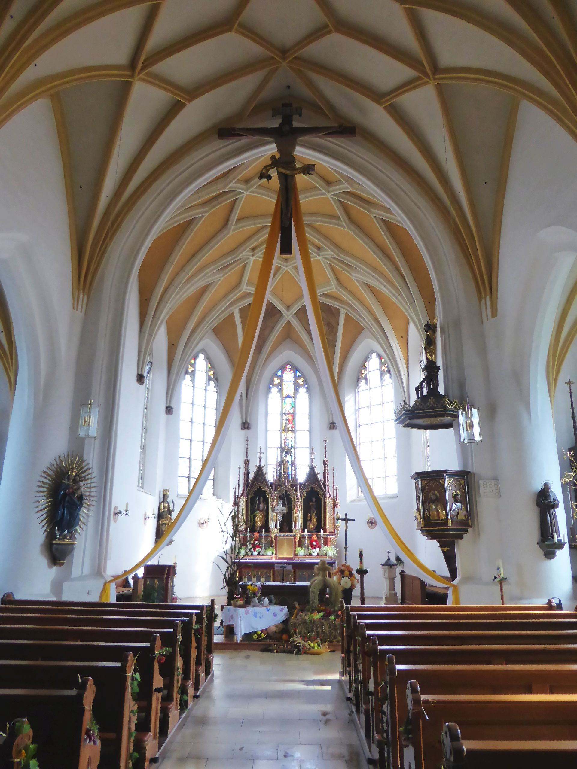 Massing (Wallfahrtskirche St. Corona Staudach)